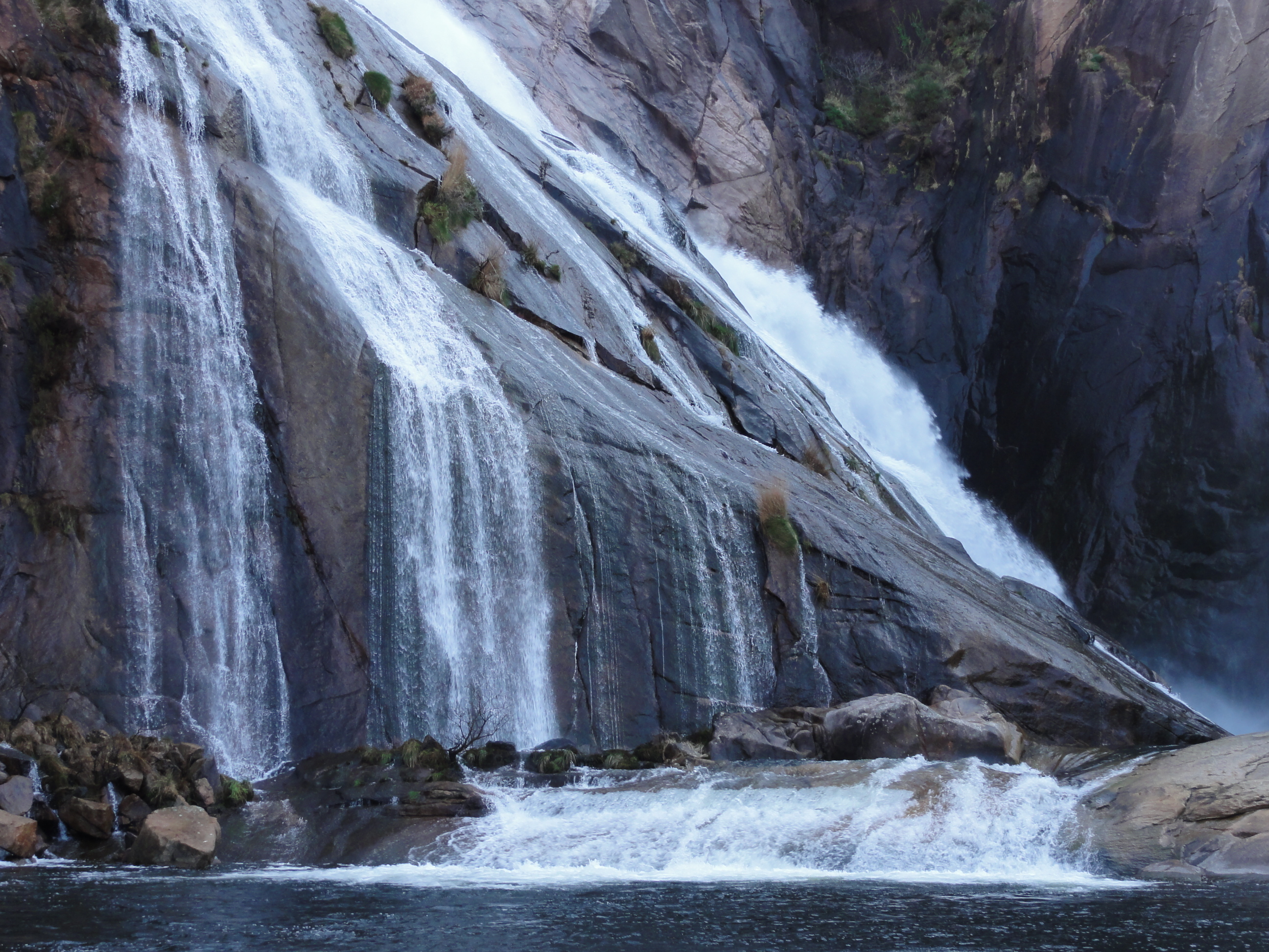 Carnota - Monte Pindo - Cascada del Ézaro This is a photography of a Site of Community Importance in Spain with the ID: ES1110008. Natura2000 entry, EEA entry